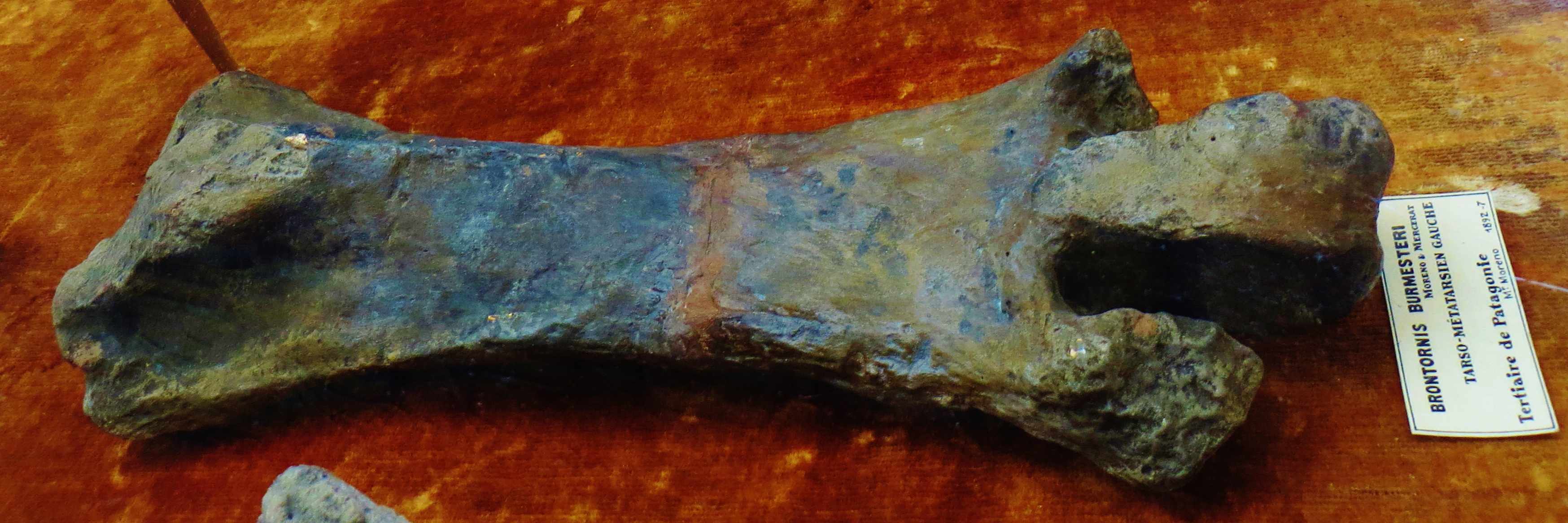 Fossil of Brontornis, an extinct bird- Took the photo at Museum Histoire Naturelle, Paris